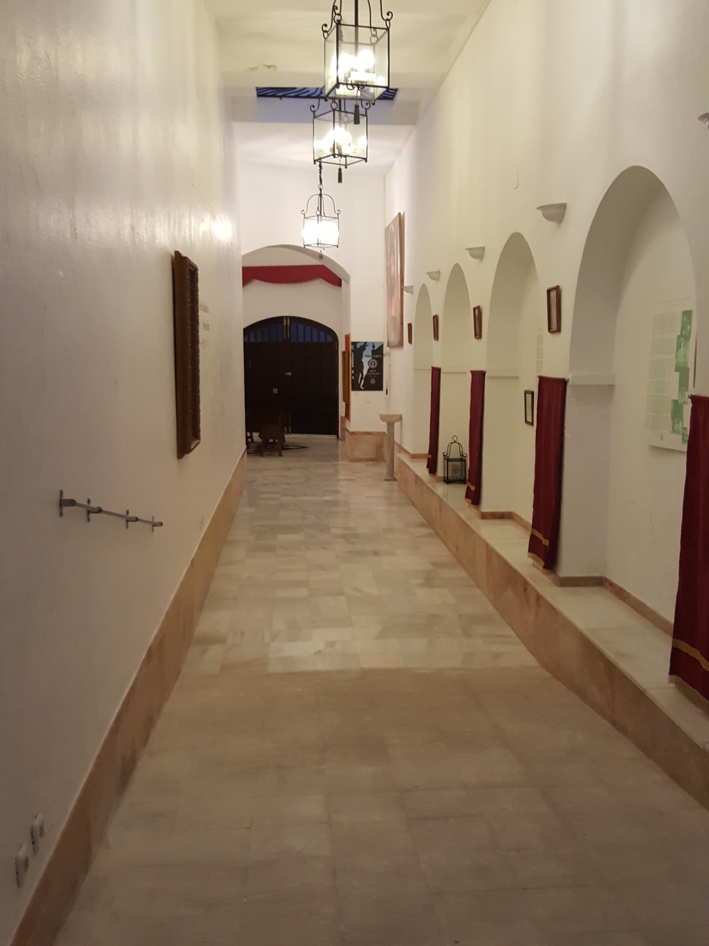 Capilla del Hospital del Corpus Christie. Interior de la Capilla. Moguer (España)